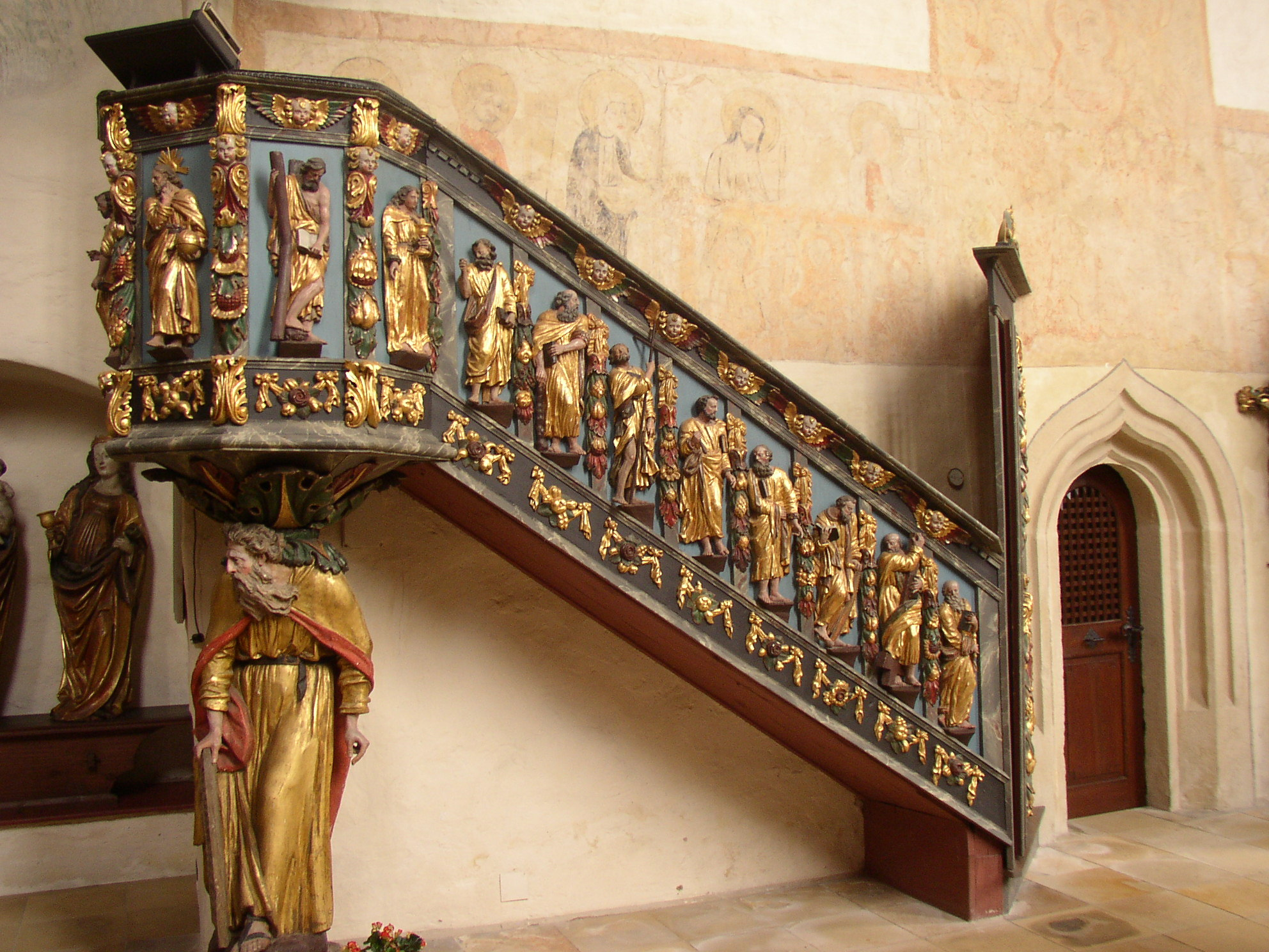 Pilgramsreuth Kanzel